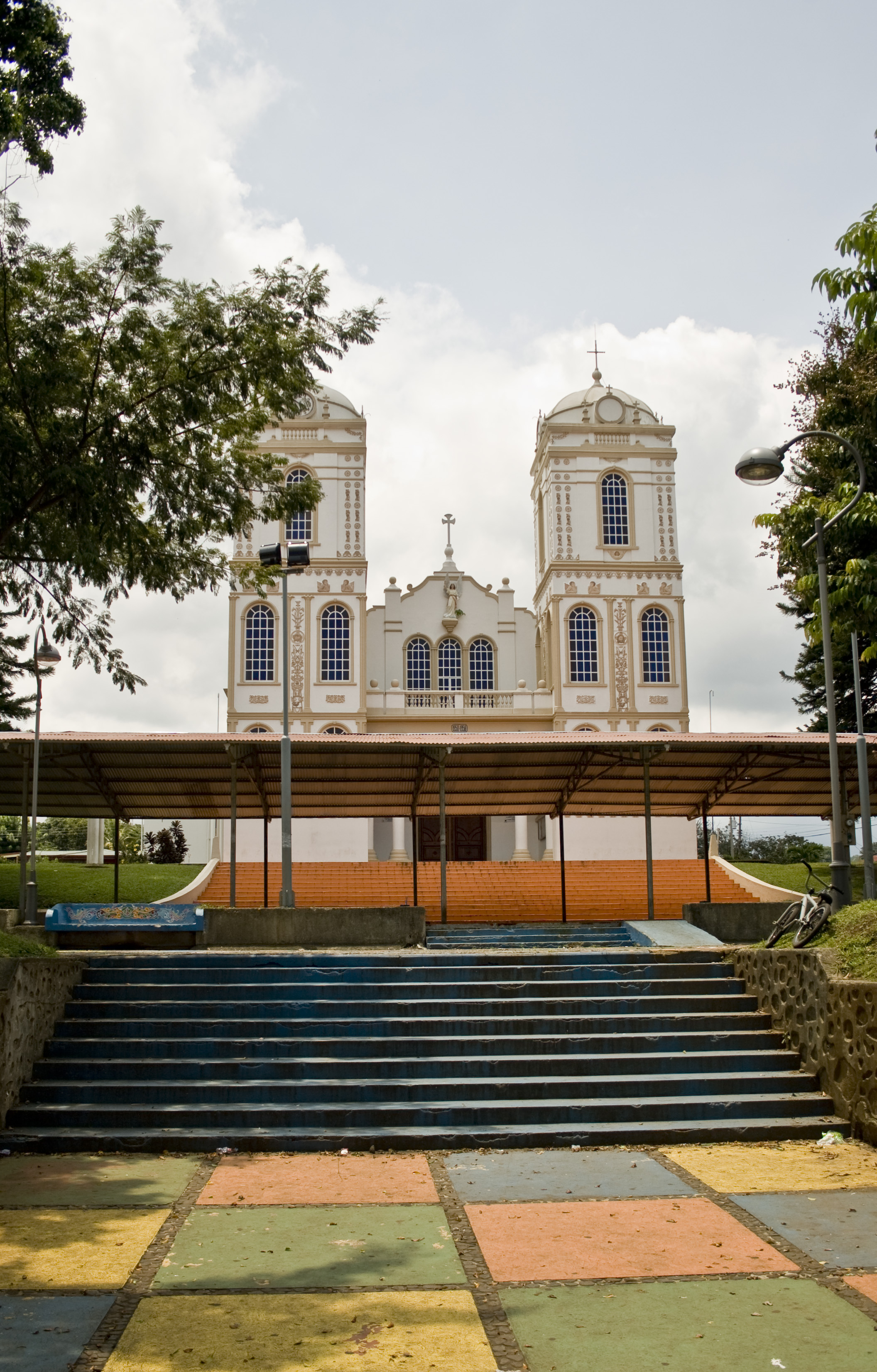 Iglesia de Sarchí. Valverde Vega, Alajuela, Costa Rica.